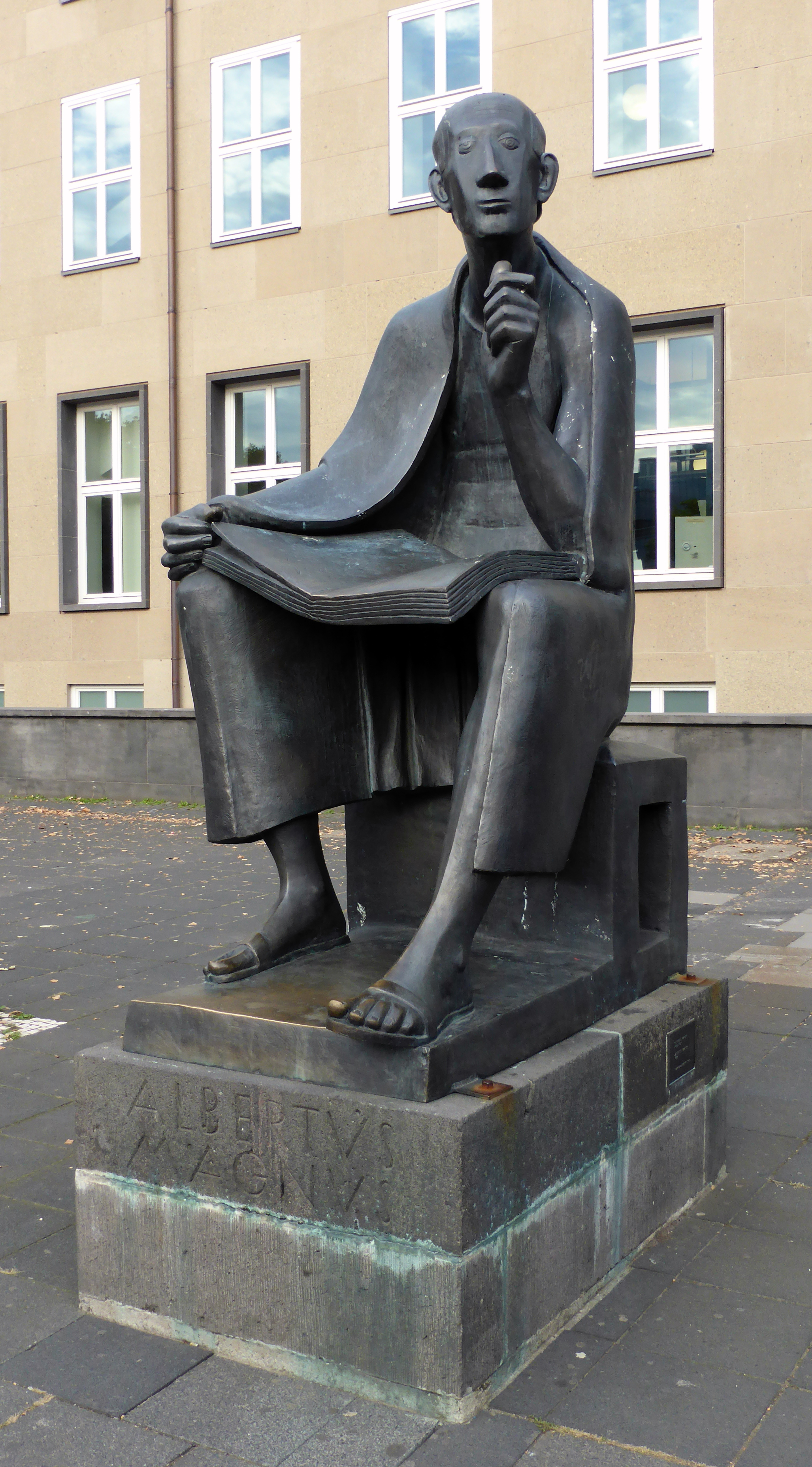 Albertus Magnus-Skulptur vor dem Hauptgebäude der Universität zu Köln. This is a photograph of an architectural monument.